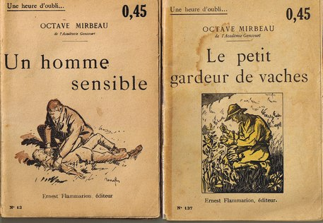 couvertures de Un homme sensible (1919) et Le Petit gardeur de vaches (1922), d'Octave Mirbeau (1848-1917)